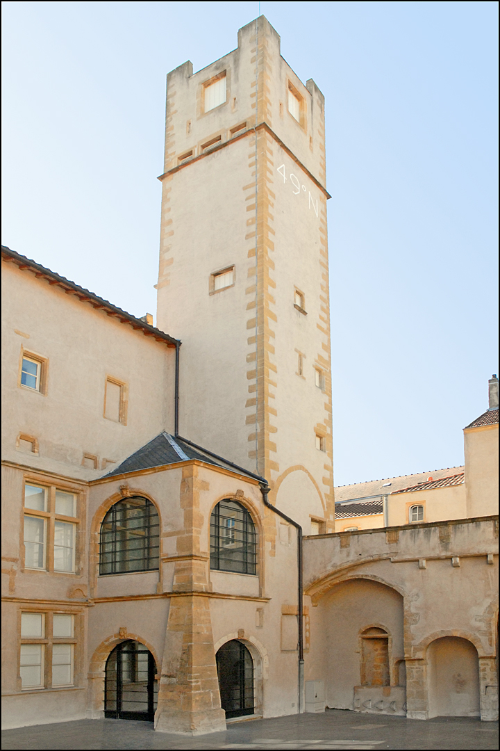 L'hôtel Saint-Livier de Metz est l'un des édifices les plus remarquables de la ville ancienne. Il a été bâti, à la fin du XIIème siècle, sur la colline Sainte-Croix pour des raisons de défense puis a été utilisé comme habitation. Actuellement, il abrite le Fonds régional d'art contemporain de Lorraine (FRAC). 49 Nord 6 EST